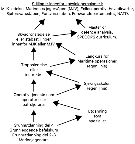 Karrierevei, fra offentliggjort informasjon i FFI-rapport 2012/00516.